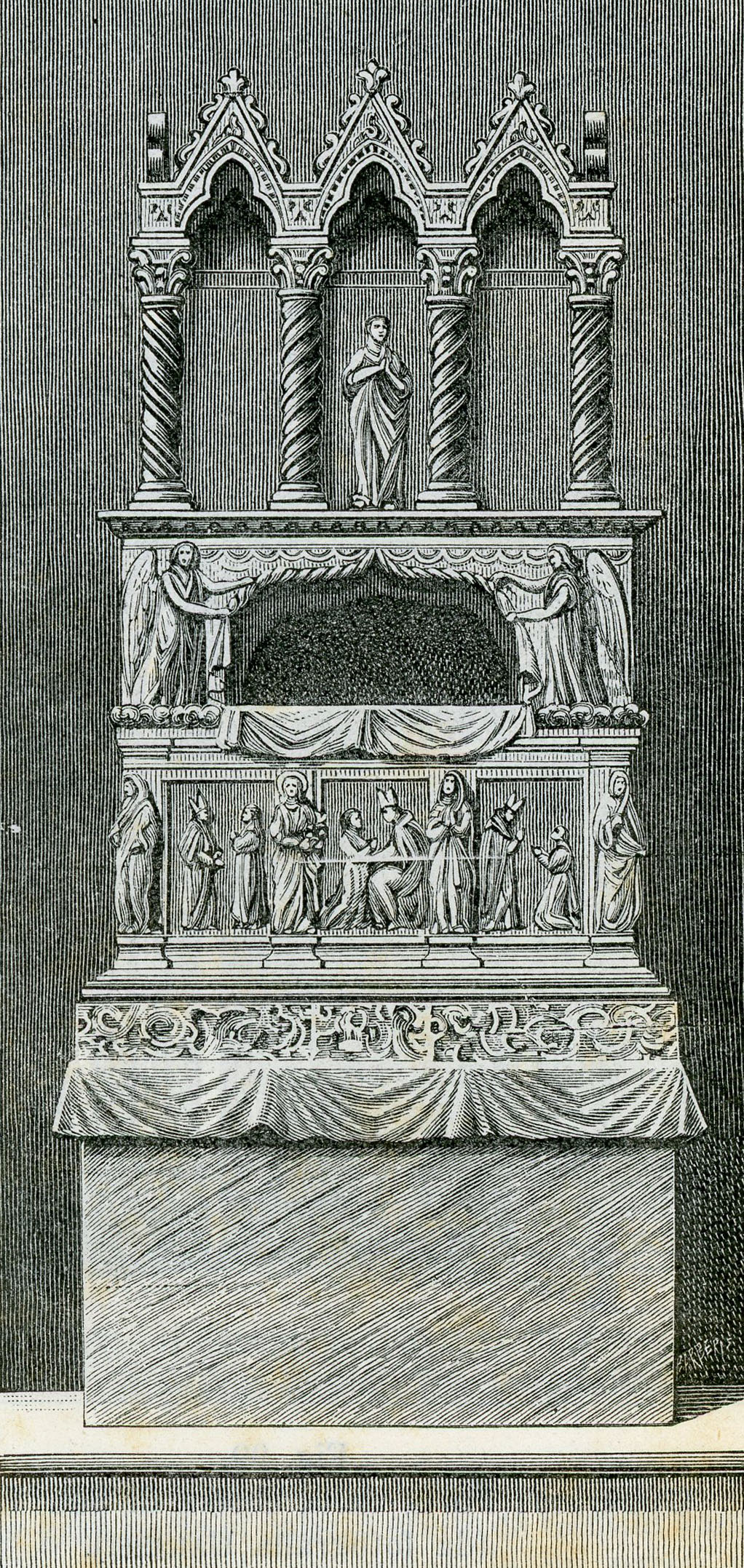 Camerino: Mausoleo di S. Ansovino nella Cattedrale (xilografia).